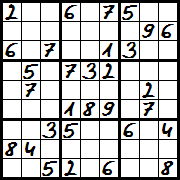 Sudoku